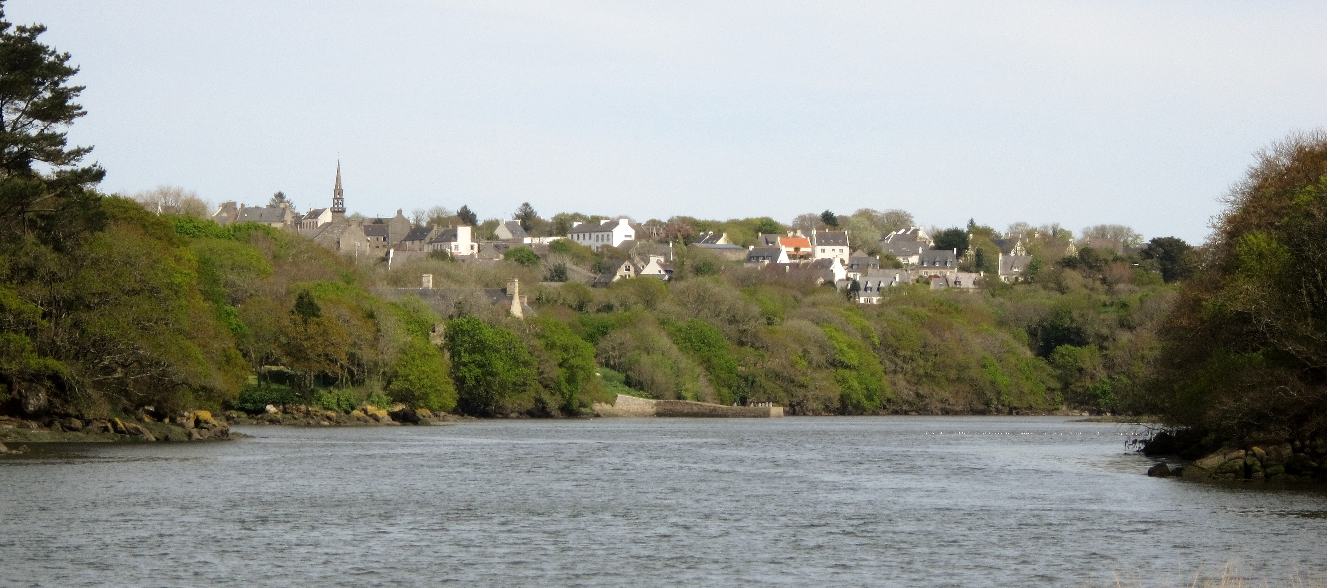 Brélès vu depuis le sentier littoral GR 34 (rive gauche de l'Aber Ildut, commune de Plouarzel).